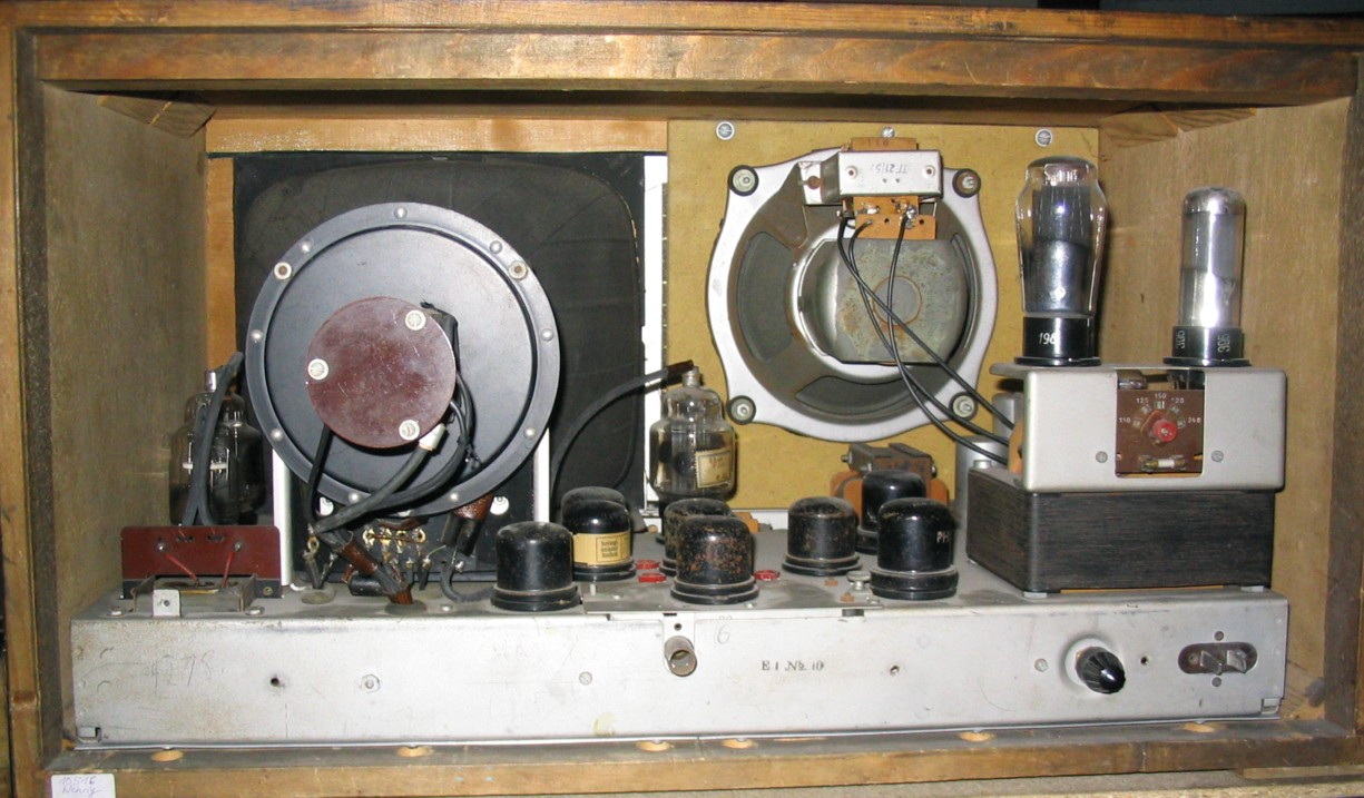 Deutscher Fernseh-Einheitsempfänger E1 (1939)